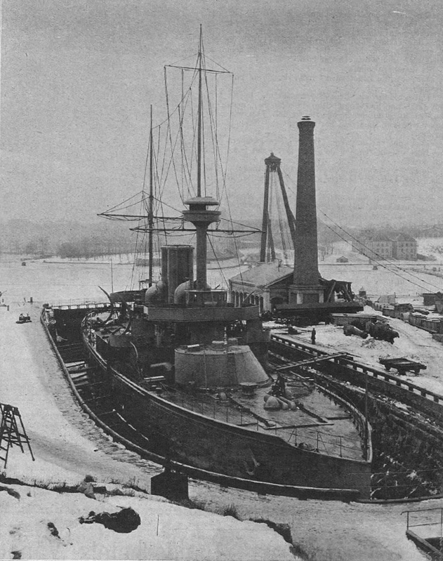 HMS Thor i docka på Galärvarvet